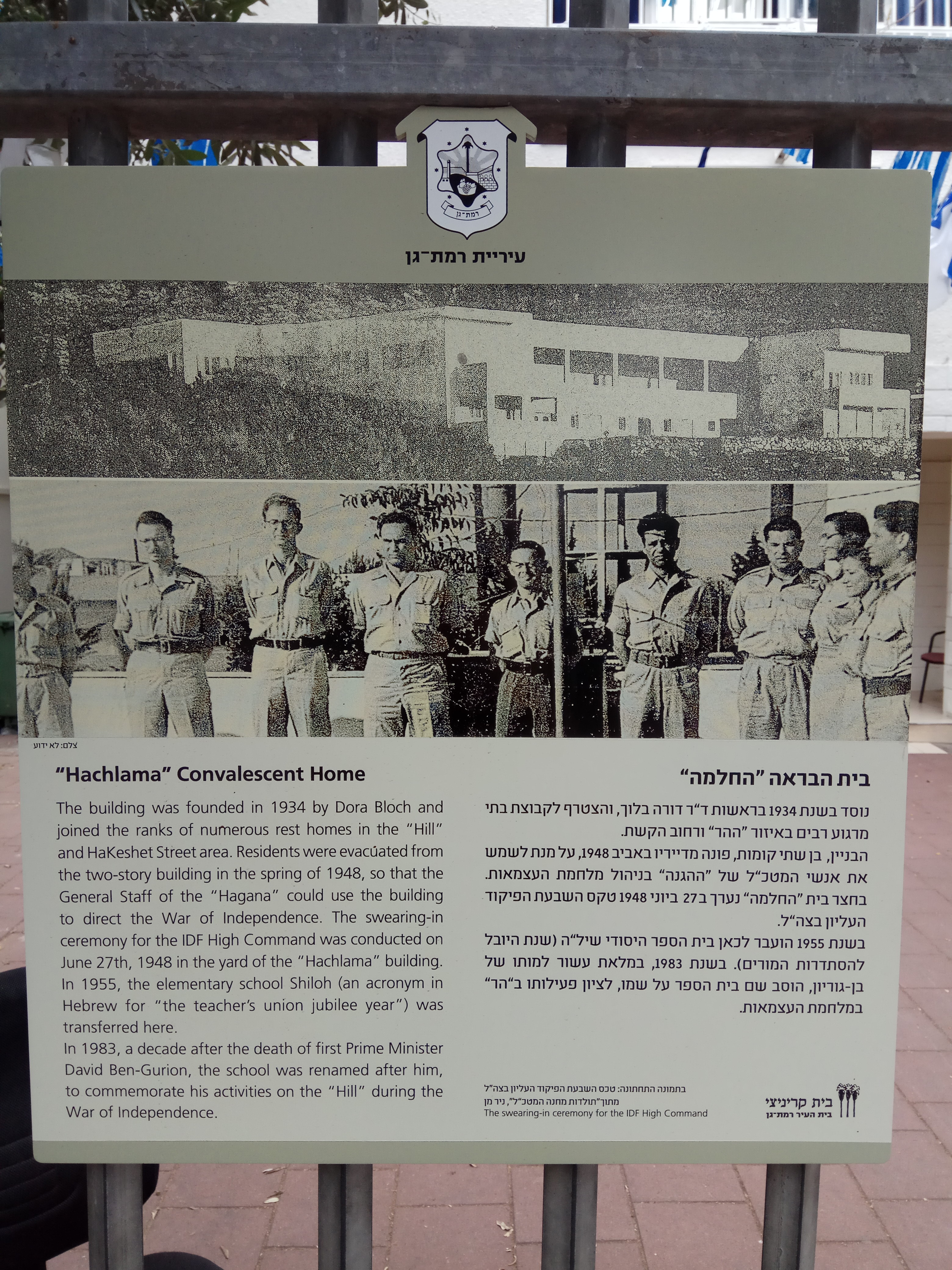 שלט הסבר בכניסה לבית הספר בן גוריון לבית המפקדה הראשון של המטכ"ל